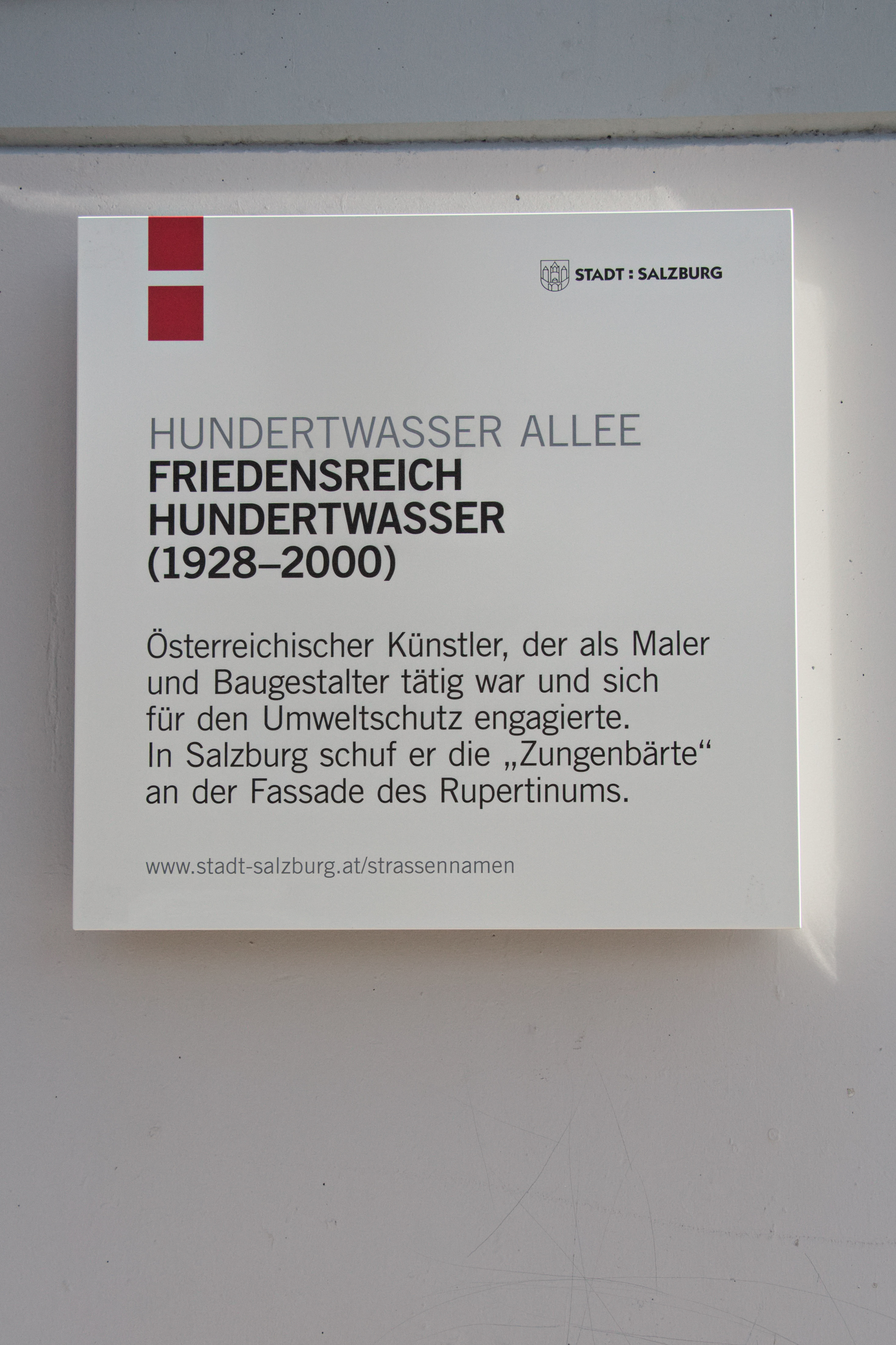 Das Schild mit der Beschreibung der Hundertwasser-Allee im Salzburger STadtteil Parsch befindet sich angebracht auf einer Außenmauer der Eishalle im Volksgarten., bei der die Allee endet.